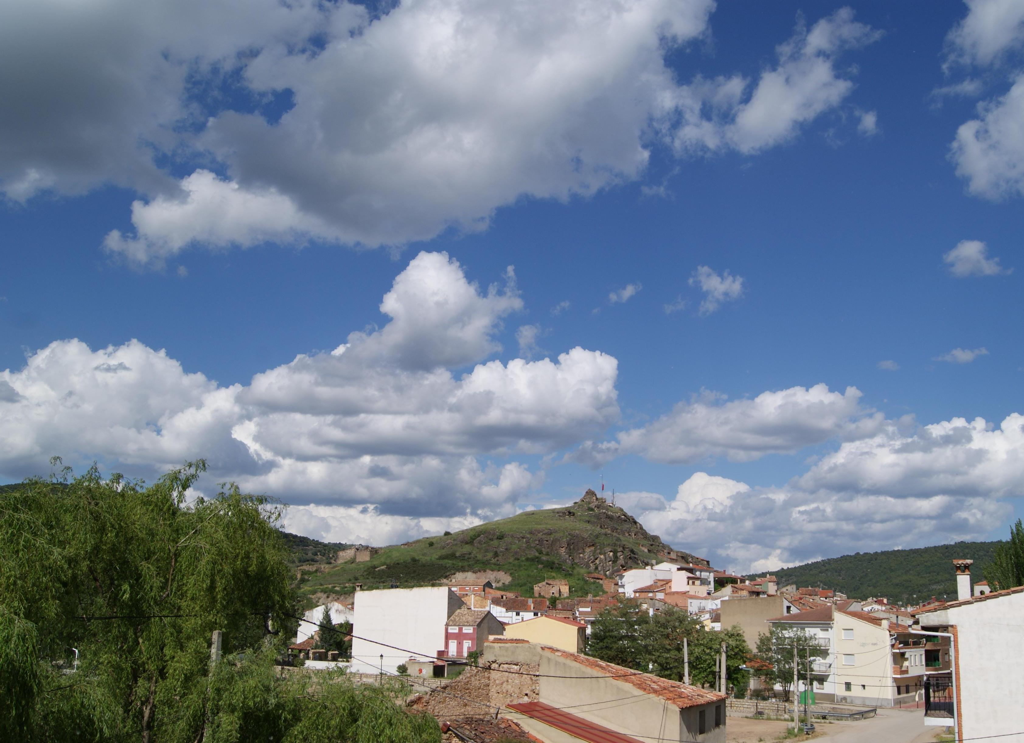 EL PUEBLO DE BONICHES Y LA PICOTA. 28 DE MAYO DE 2011.